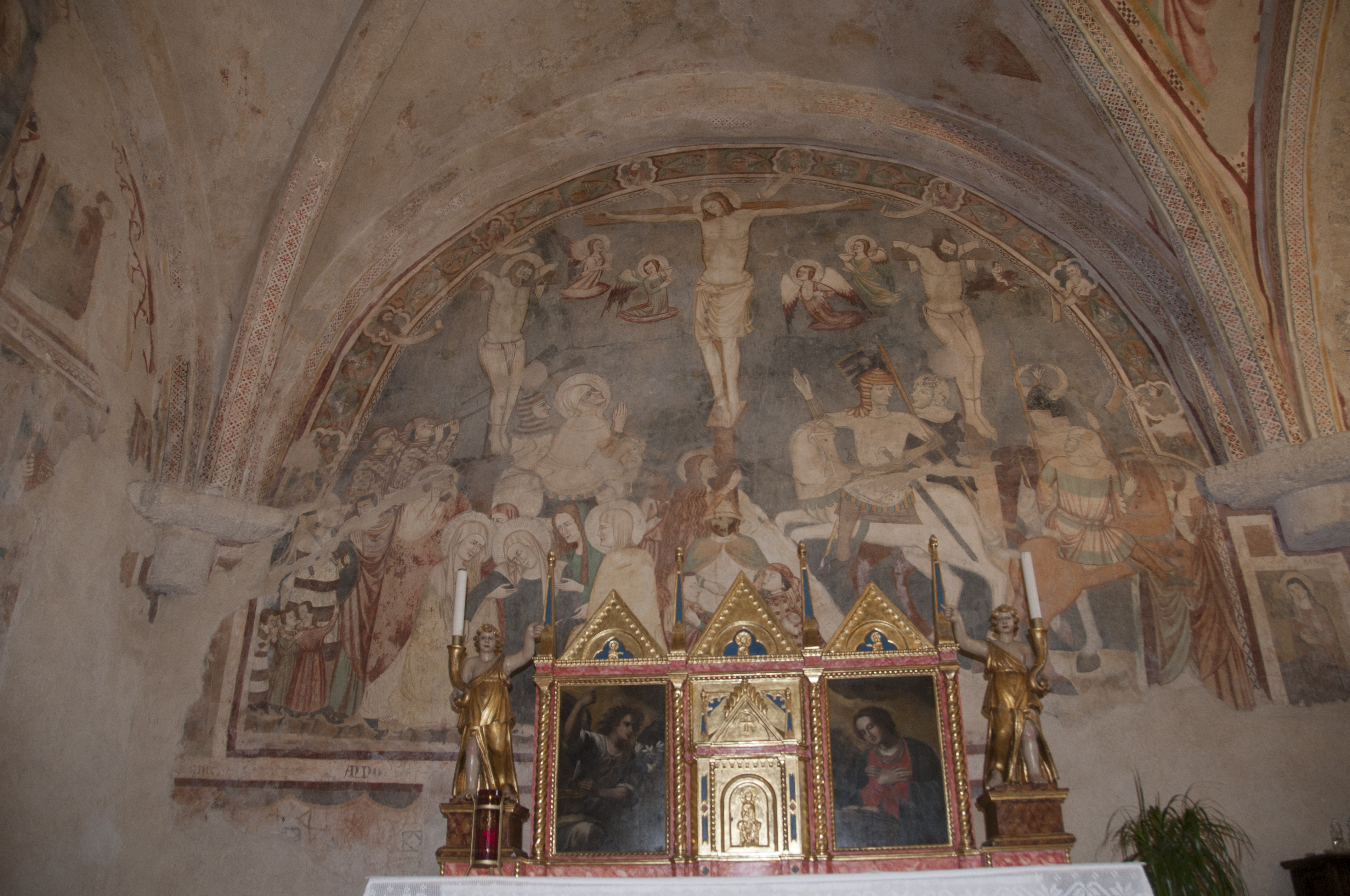 Chiesa di San Salvatore Campi